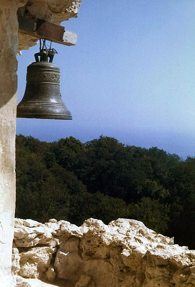 Aussicht vom Kloster Aladzho (Bulgarien)